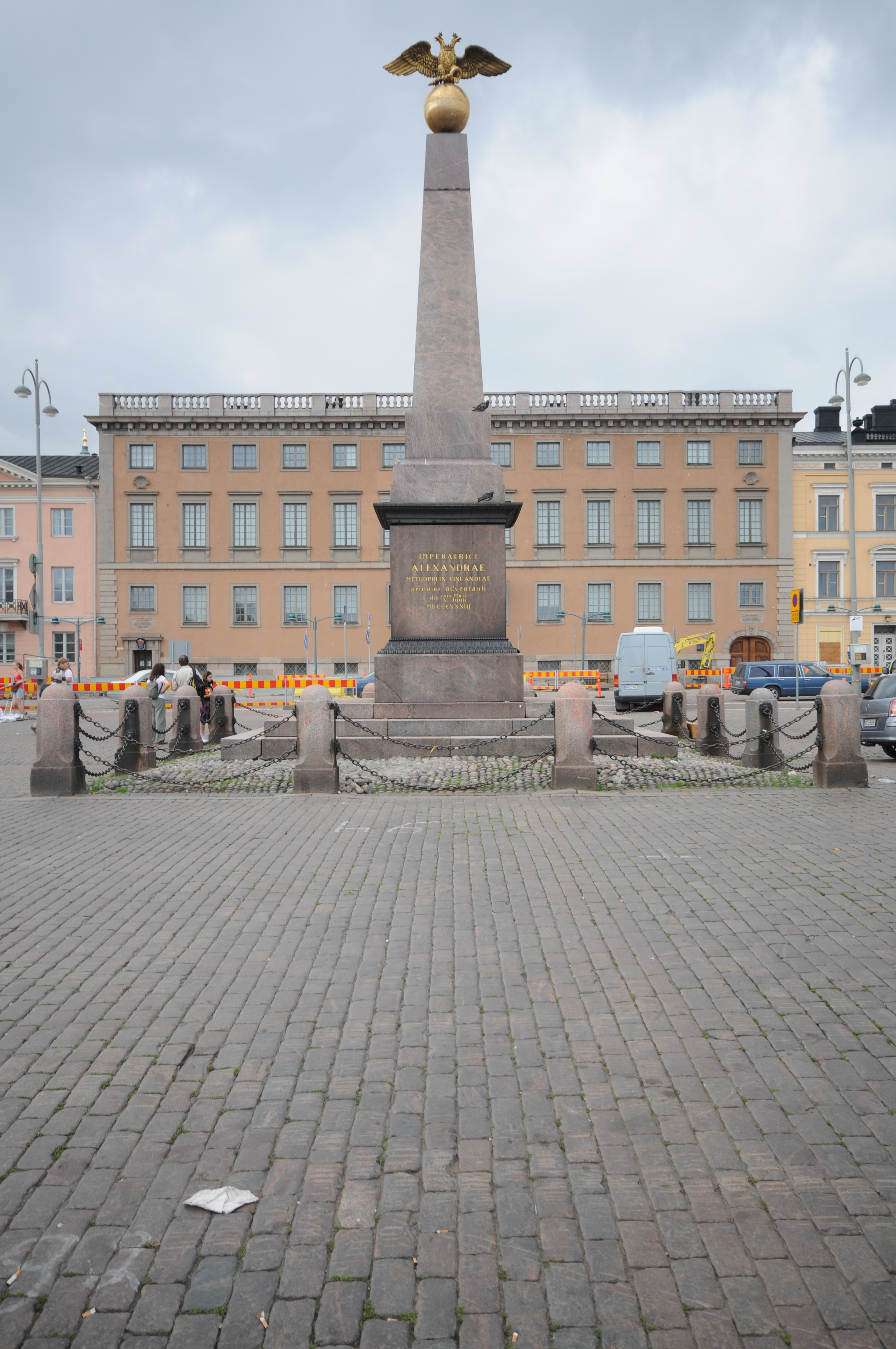 Helsinki